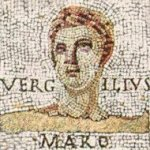 Vergil